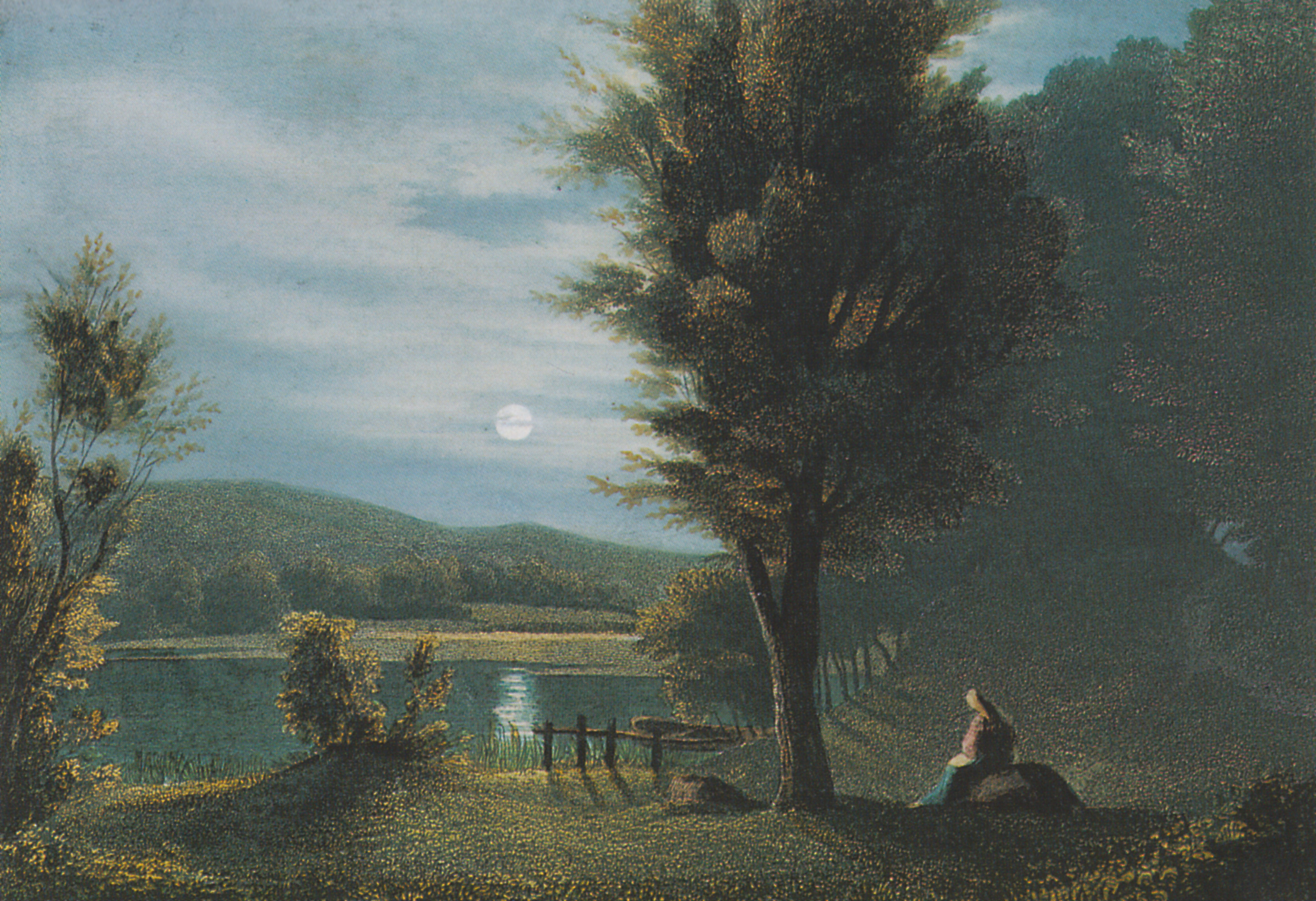 Der Herthasee auf Jasmund (Rügen) im Mondschein, fabige Zeichnung